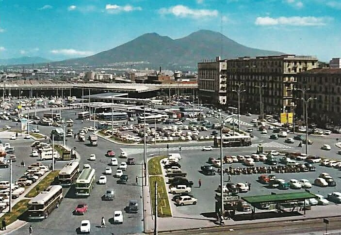 Napoli, piazza Garibaldi nel 1971. Cartolina. Autore sconosciuto